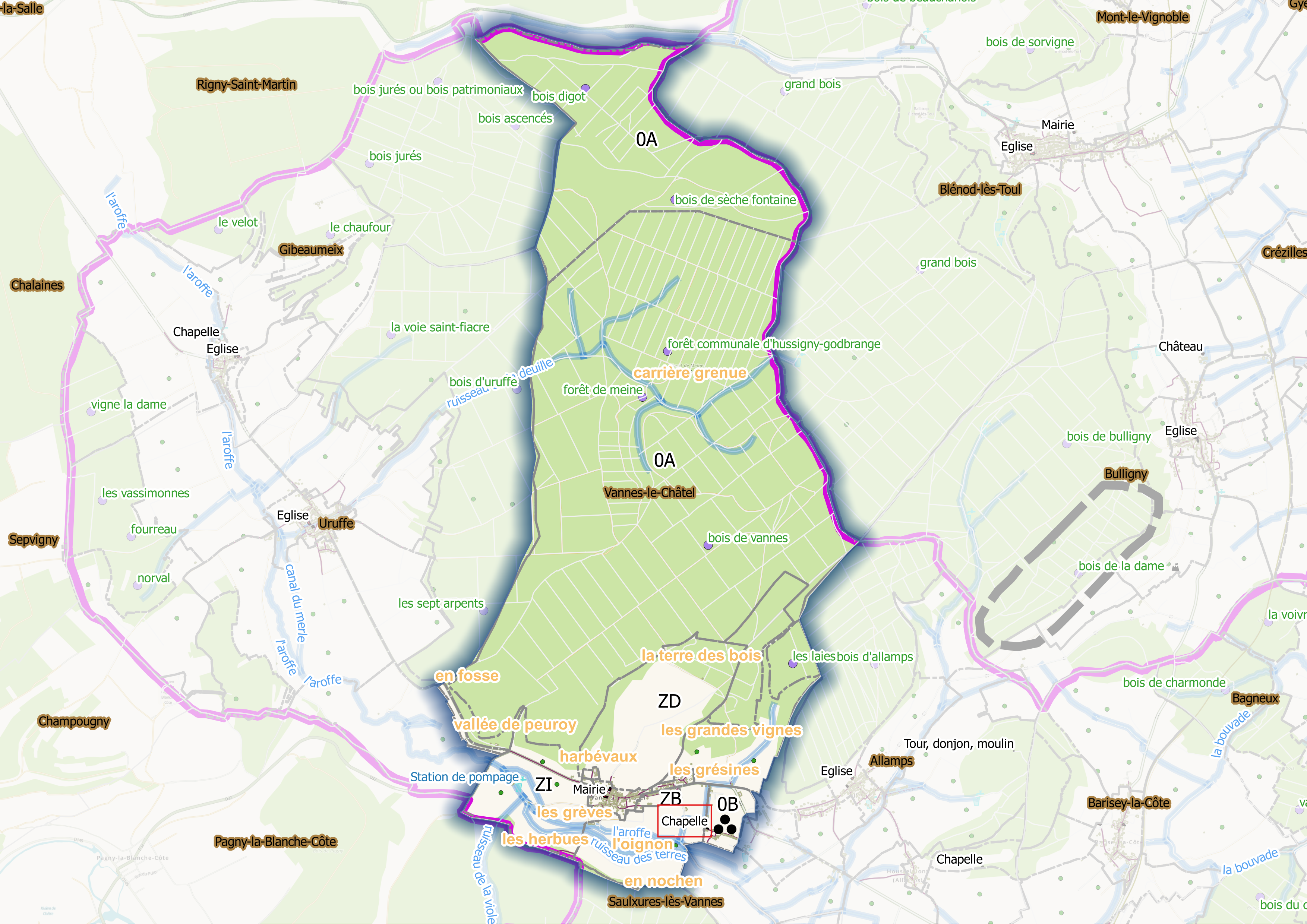 Vannes-le-Châtel (ban communal) - Osm et Qgis, ajout de mentions relatives à l'article Wikipédia sur cette commune